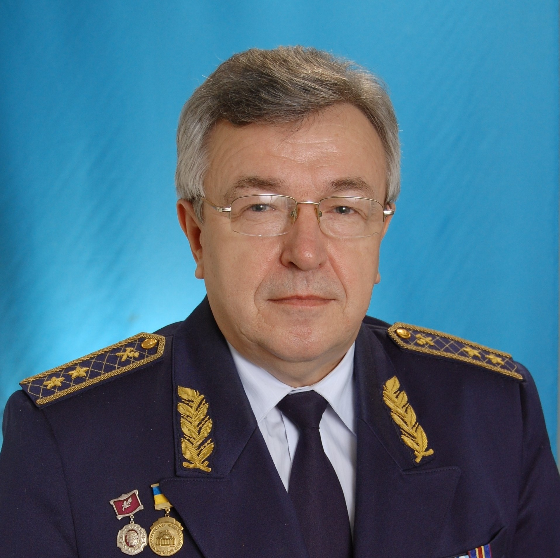 Боднар Борис Євгенович